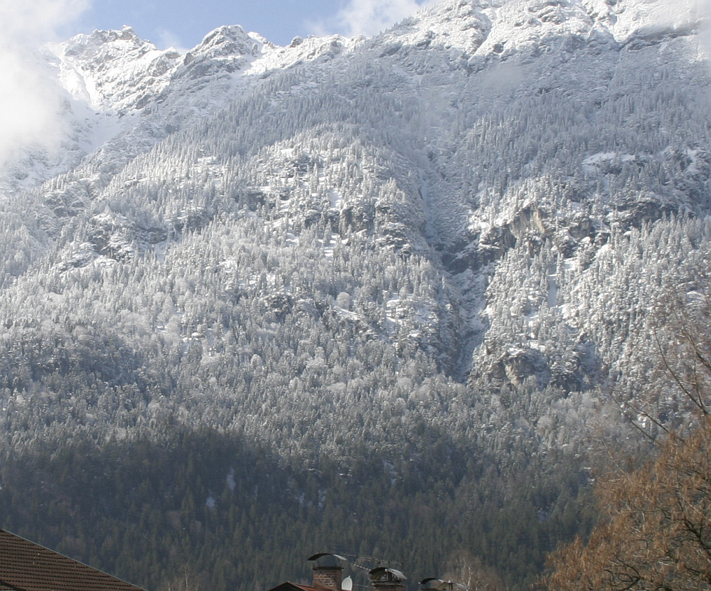 Schneefallgrenze / Berg